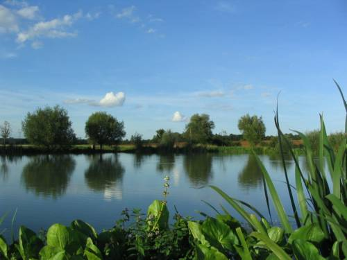 L'étang de Clemery